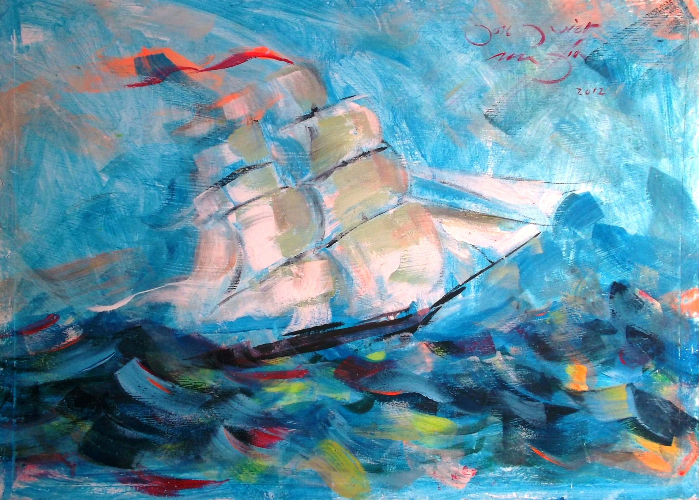 Barco This work has been released into the public domain by its author, yesvari85. This applies worldwide. In some countries this may not be legally possible; if so: yesvari85 grants anyone the right to use this work for any purpose, without any conditions, unless such conditions are required by law.